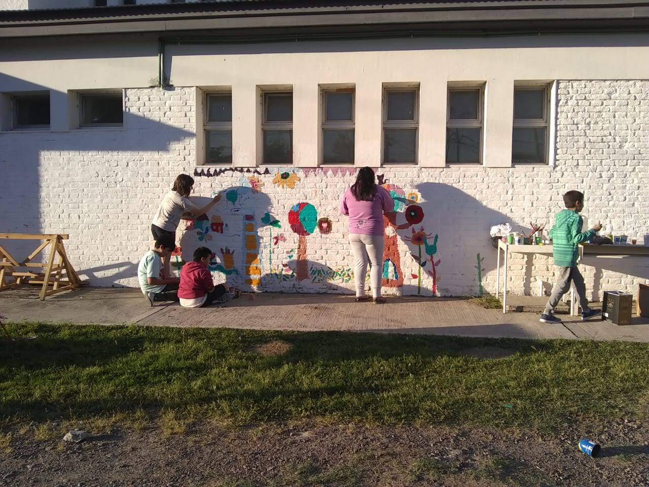 Pintura libre en el muro del Centro Municipal de Cultura